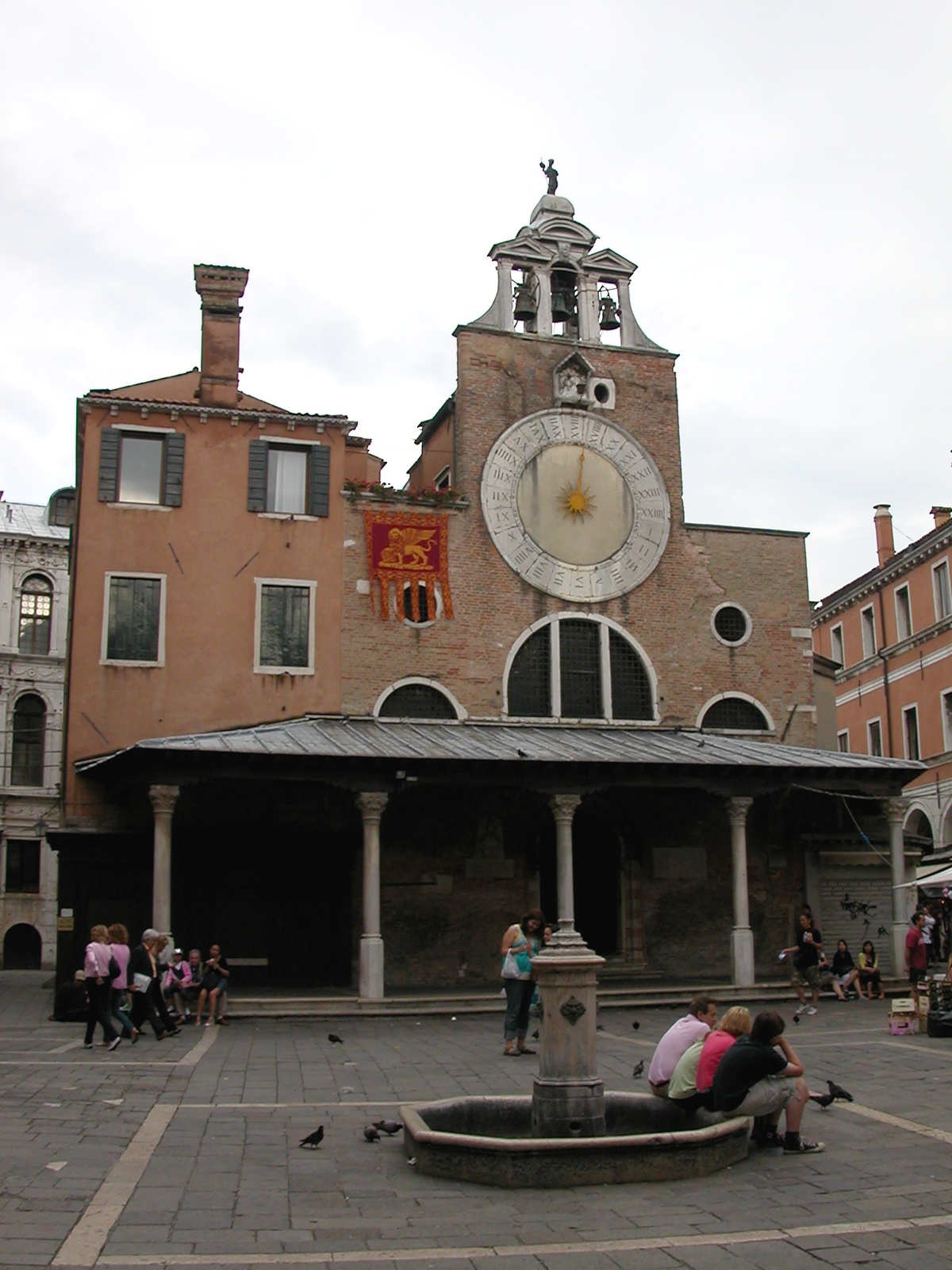 La chiesa di San Giacomo di Rialto a Venezia. 18th century. Today.